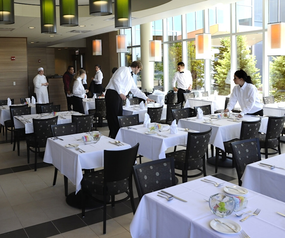 Eindecken von Gasttischen durch Studierende im (Lehr-)Restaurant Wheat Café am College of DuPage in Lisle (Illinois), USA.